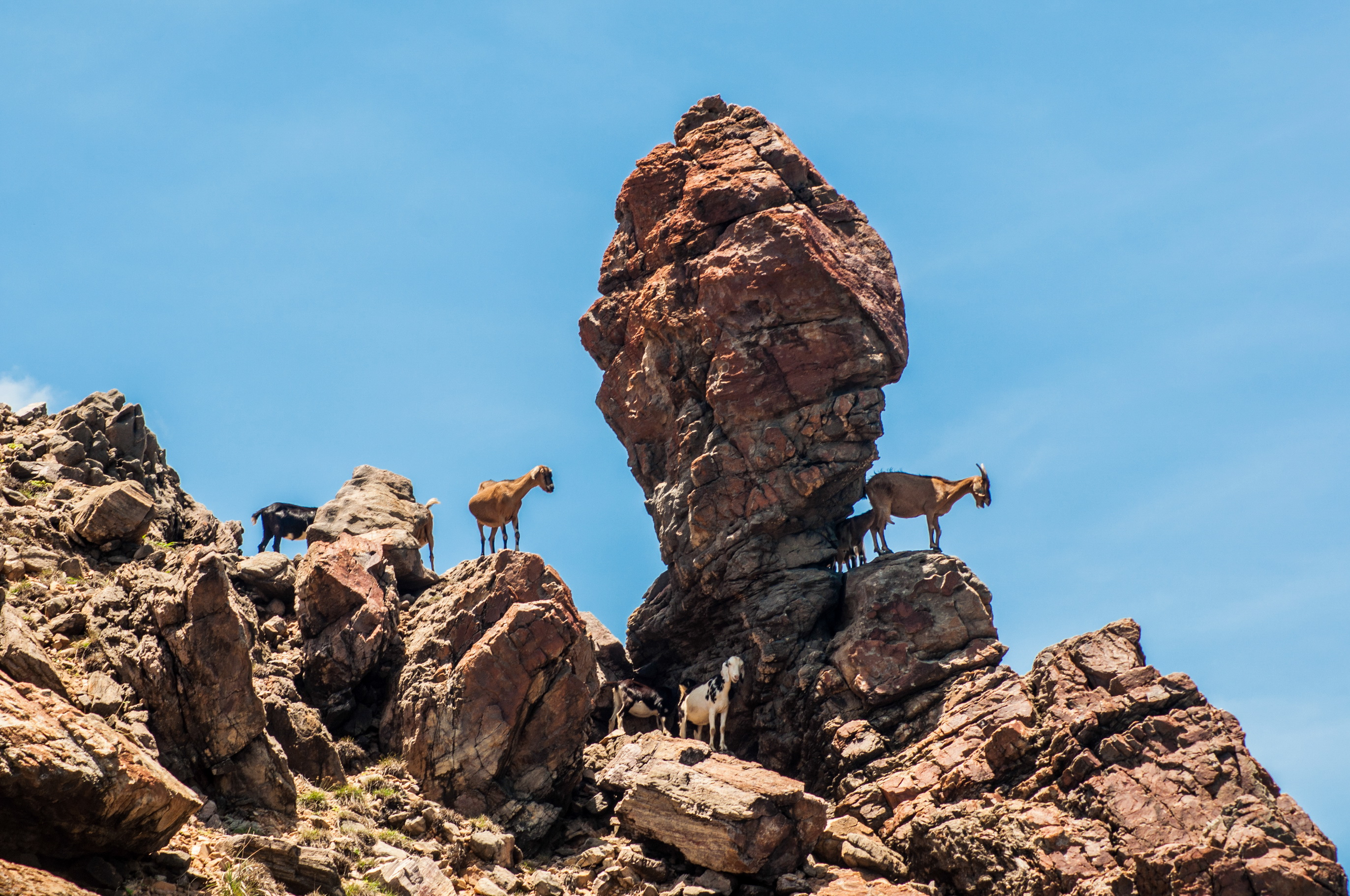 Imagem fotografada no âmbito de jericoacoara/ce